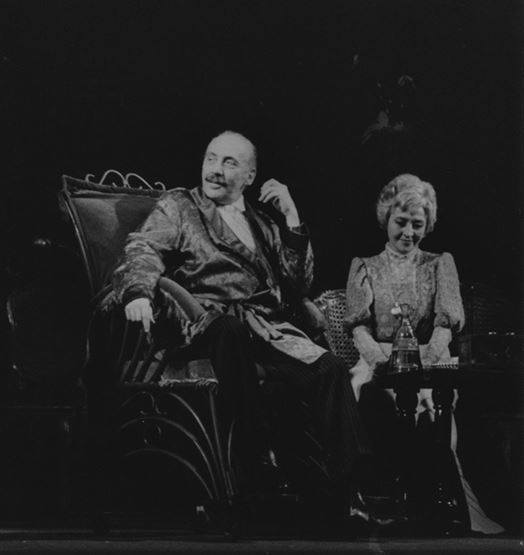 Karolina a Miloš Kopecký v divadelní hře Lištičky(1980)